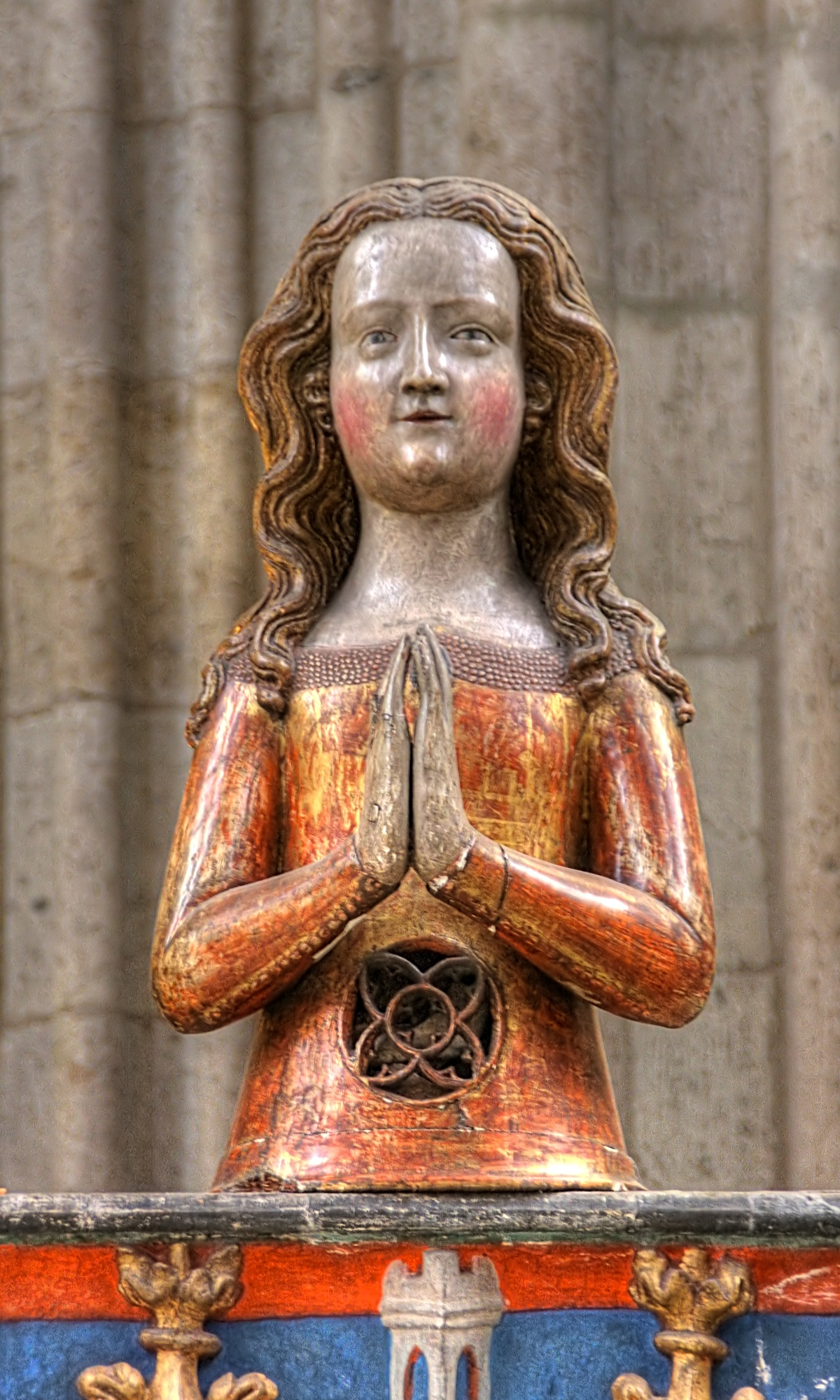 Ursulabüste im Chorraum von St. Ursula, Köln